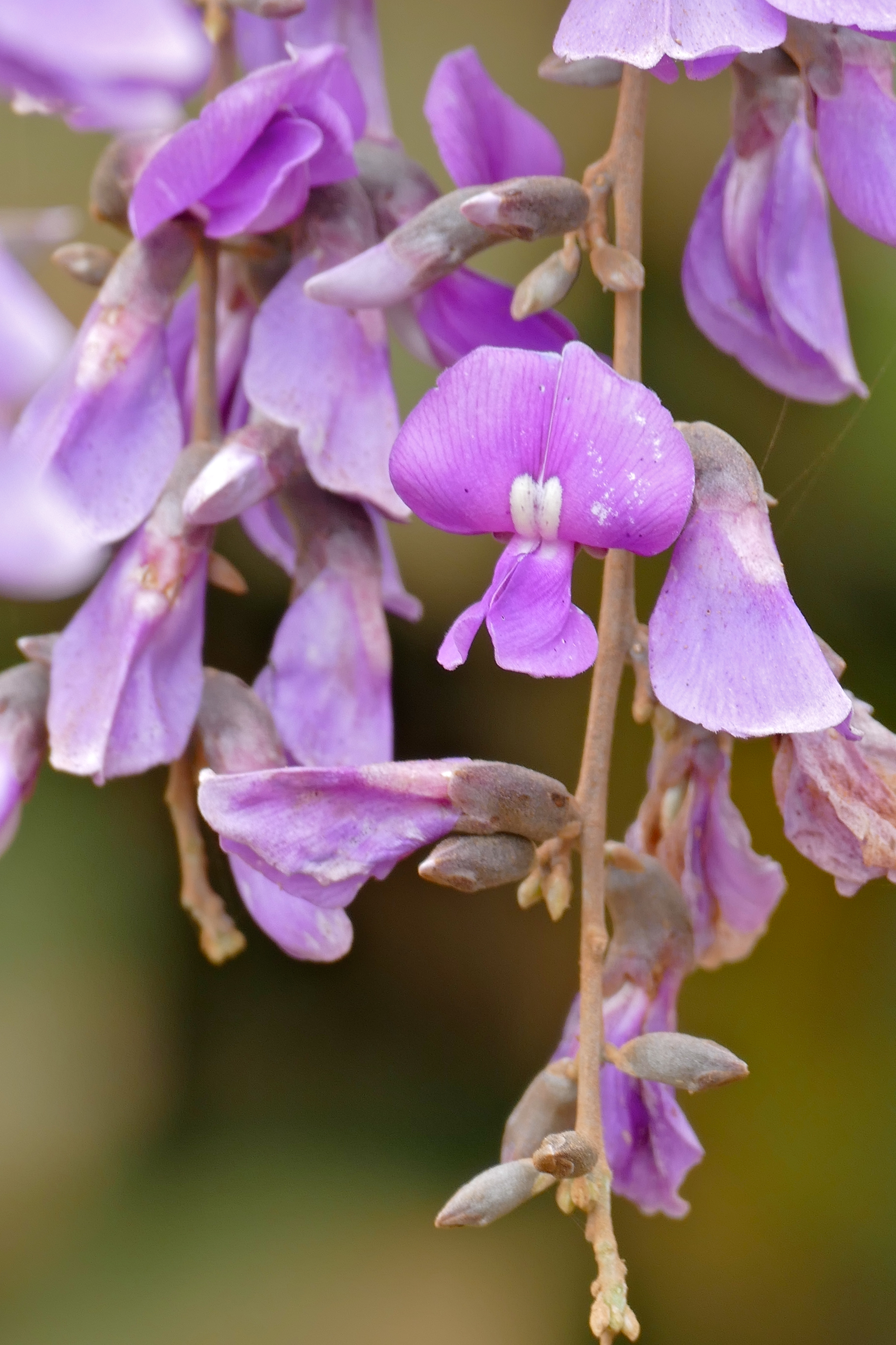 Transpantaneira, Poconé, Mato Grosso, BRAZIL